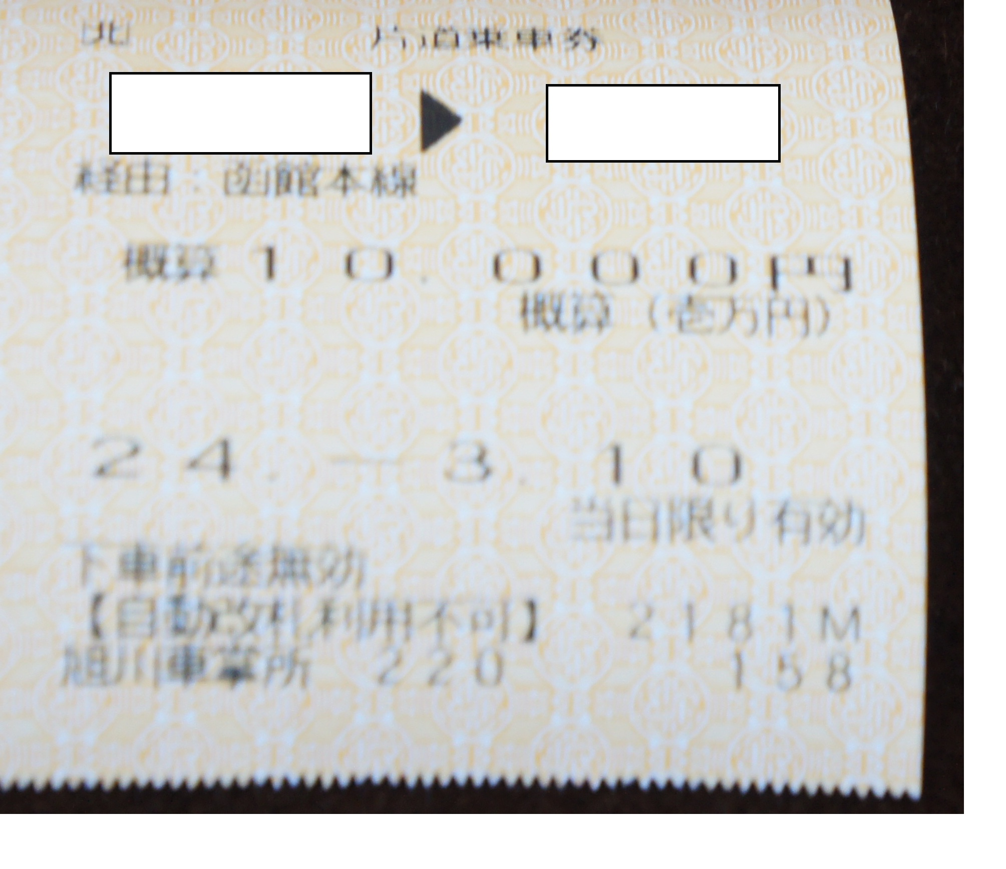 車内にて乗車券を発券依頼した際に、車掌が釣り銭不足の関係から最寄りの有人駅で釣り銭を受け取り処理が出来るよう手配処理済みの補充乗車券の一例、降車駅が有人改札が存在する事から可能な処理の例、降車駅が有人改札が存在しない場合においては途中停車駅にて釣り銭と乗車券の発券処置を依頼する例がある他、後日支払いされるよう処置をする場合もある